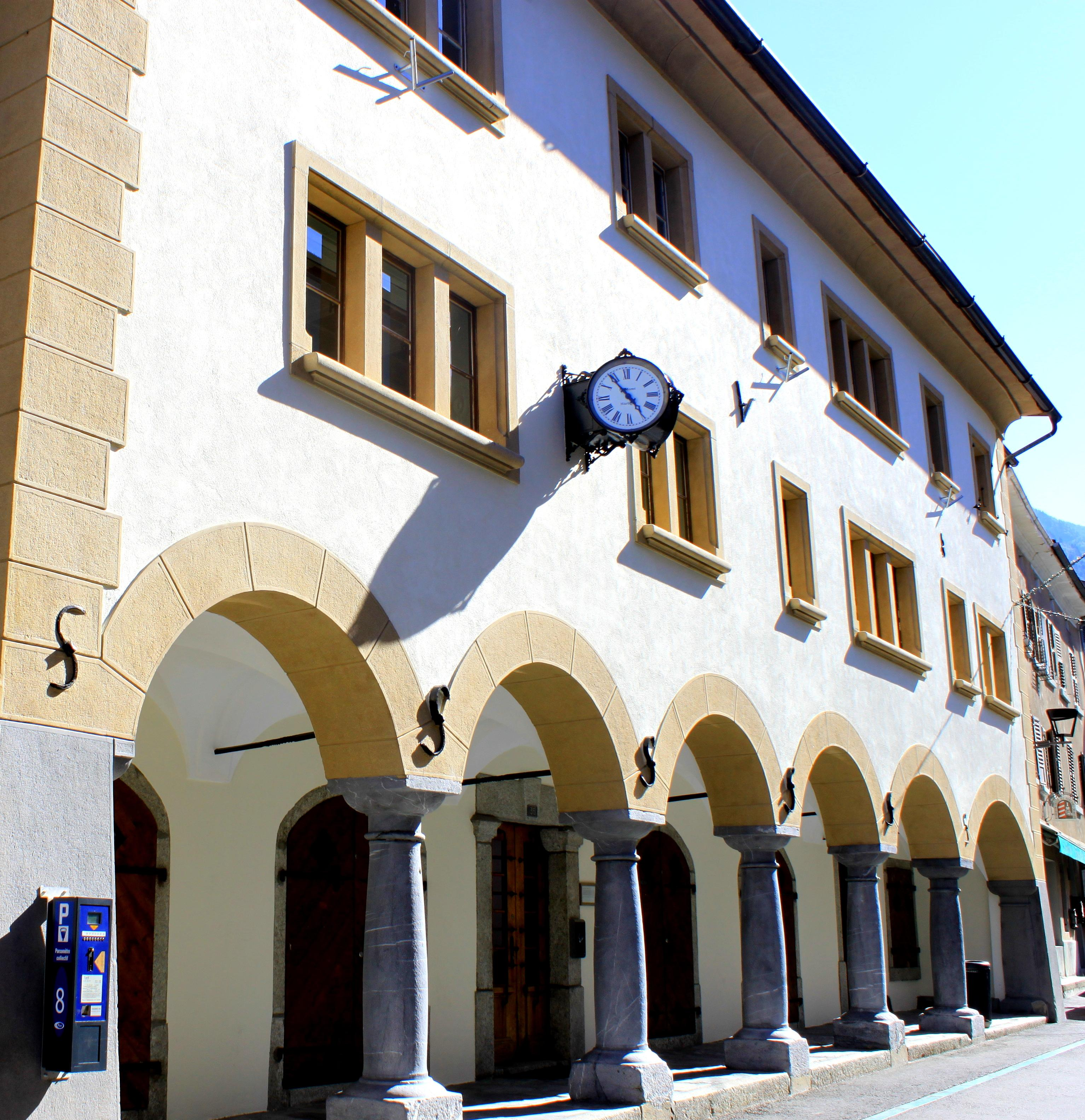 Suisse, canton du Valais, Martigny, ville romaine et moderne, ancienne maison de commune à Martigny-Bourg.